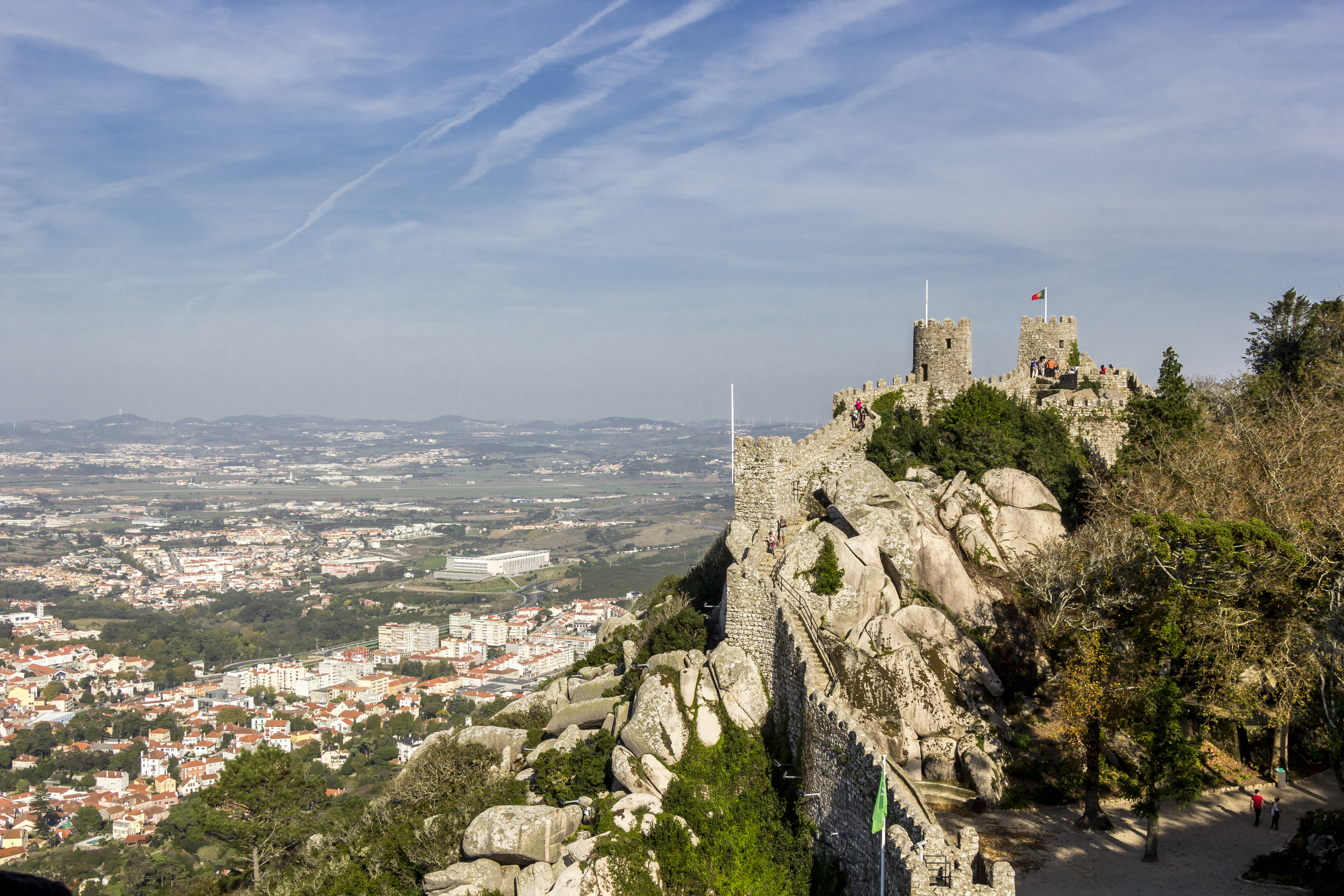 Sintra/Cascais This is a photography of a Site of Community Importance in Portugal with the ID: PTCON0008. Natura2000 entry, EEA entry